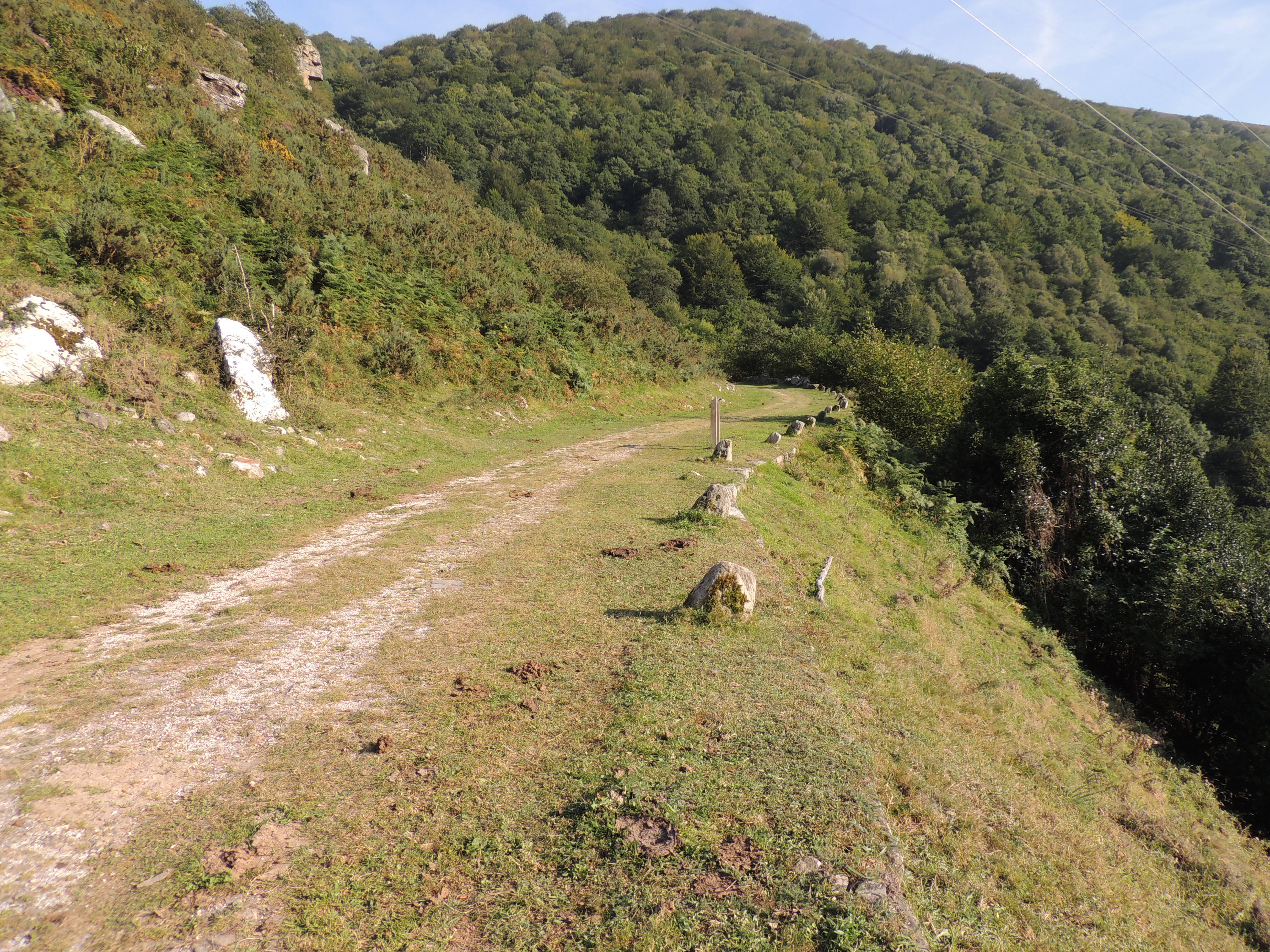 Antigua carretera que unía la meseta castellana con el Mar Cantábrico.